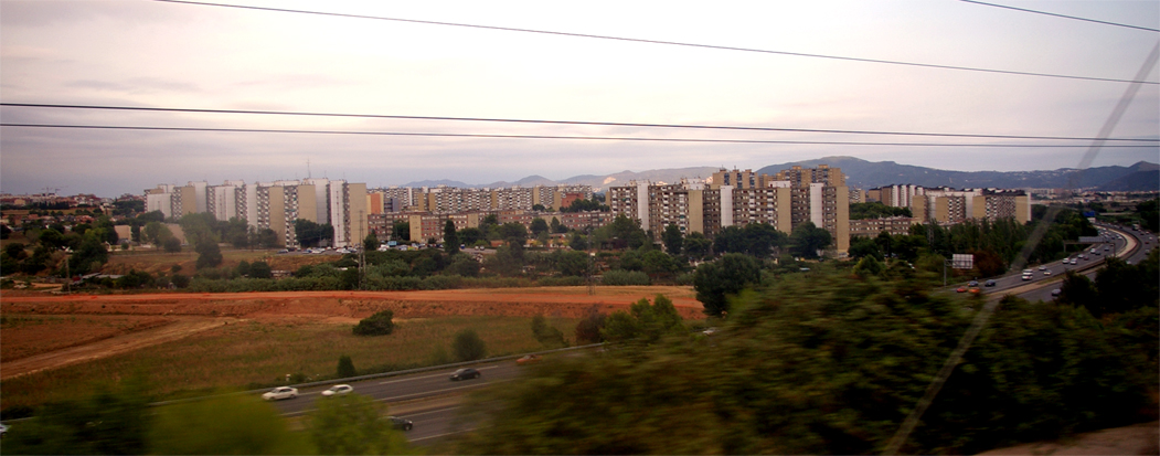 Badia del Vallès (Vallès Occidental, Catalunya)